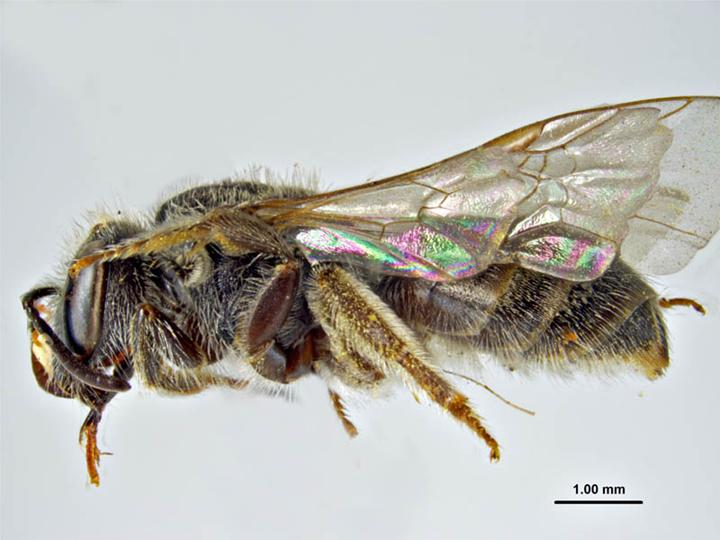 Lasioglossum clelandi female